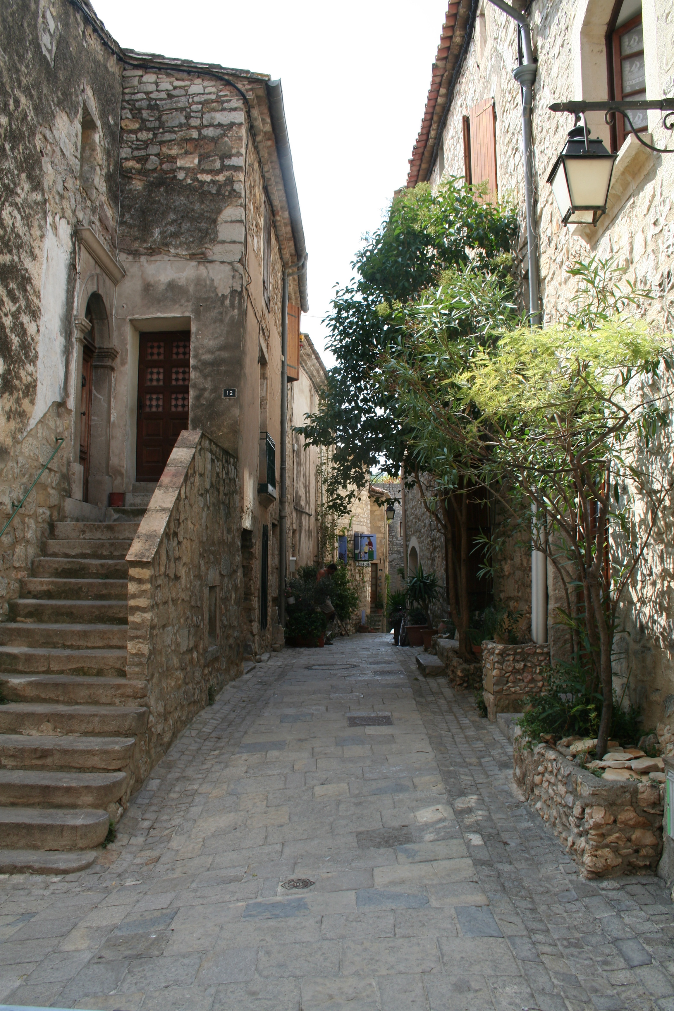 Les Matelles (Hérault) - Rue droite.